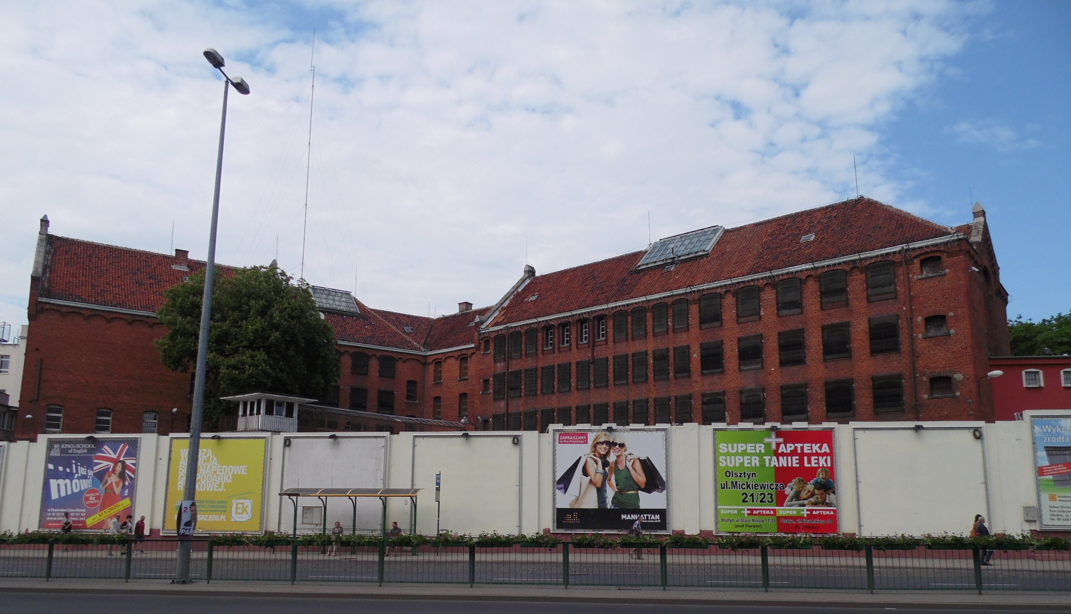 Areszt śledczy w Olsztynie.